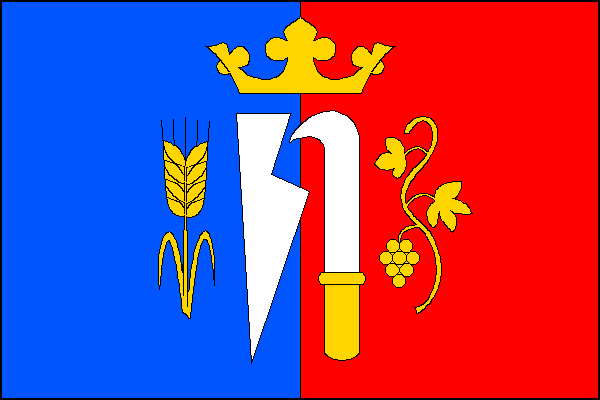 vlajka, Tasovice, okres Znojmo